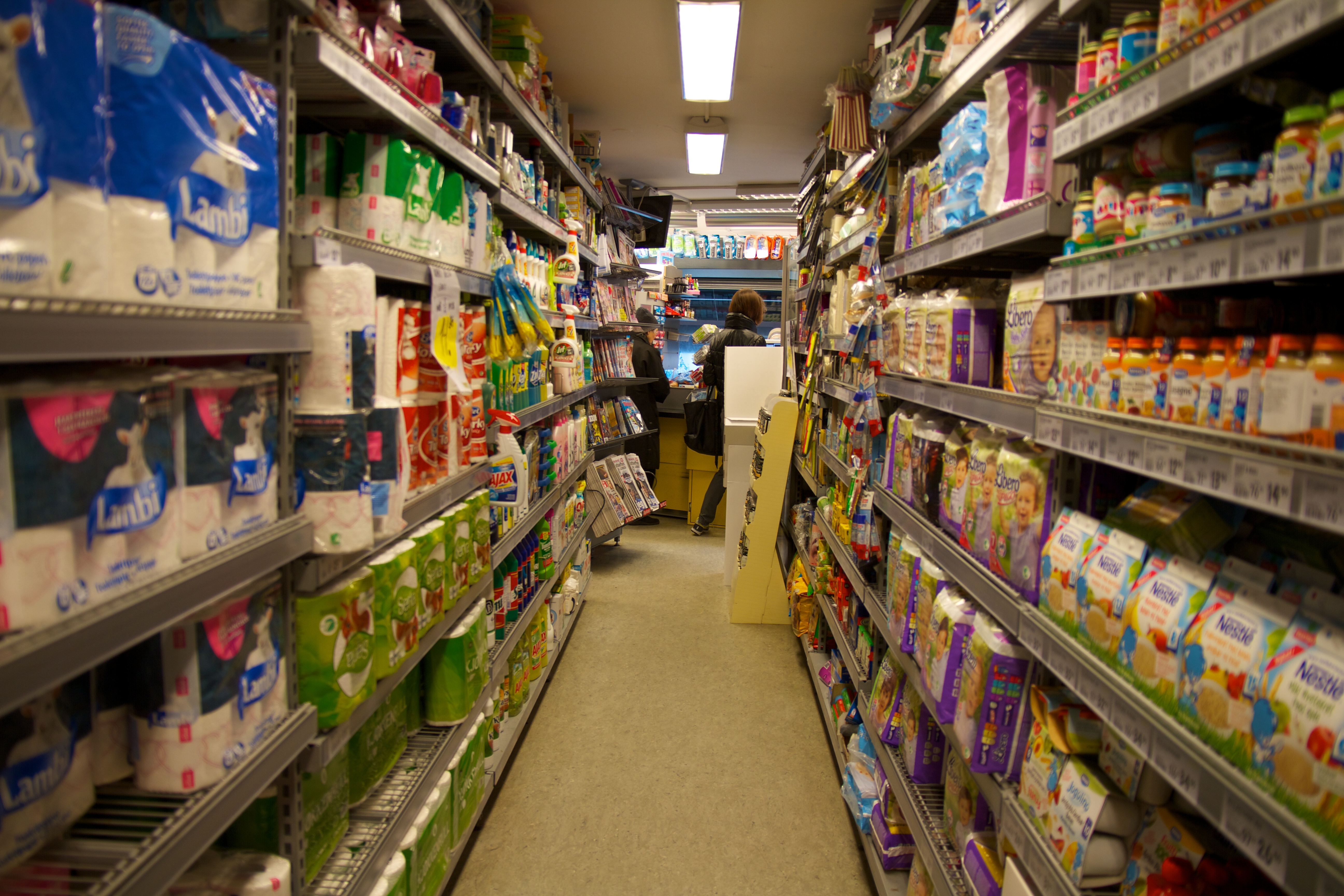 Bunnpris-butikken i Bygdøy allé i Oslo, en typisk Brustad-bu.